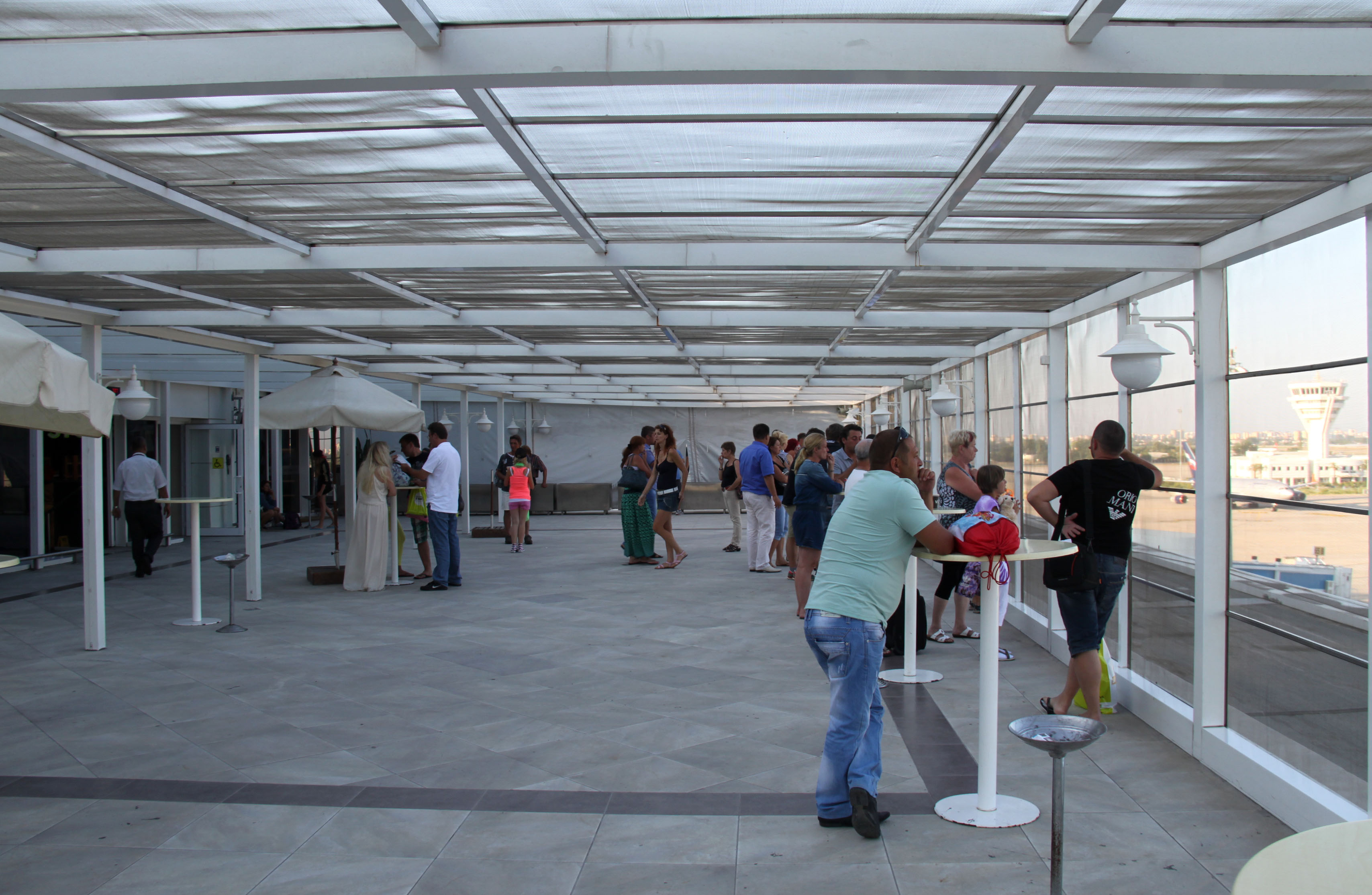 Курительная комната в аэропорту Антальи